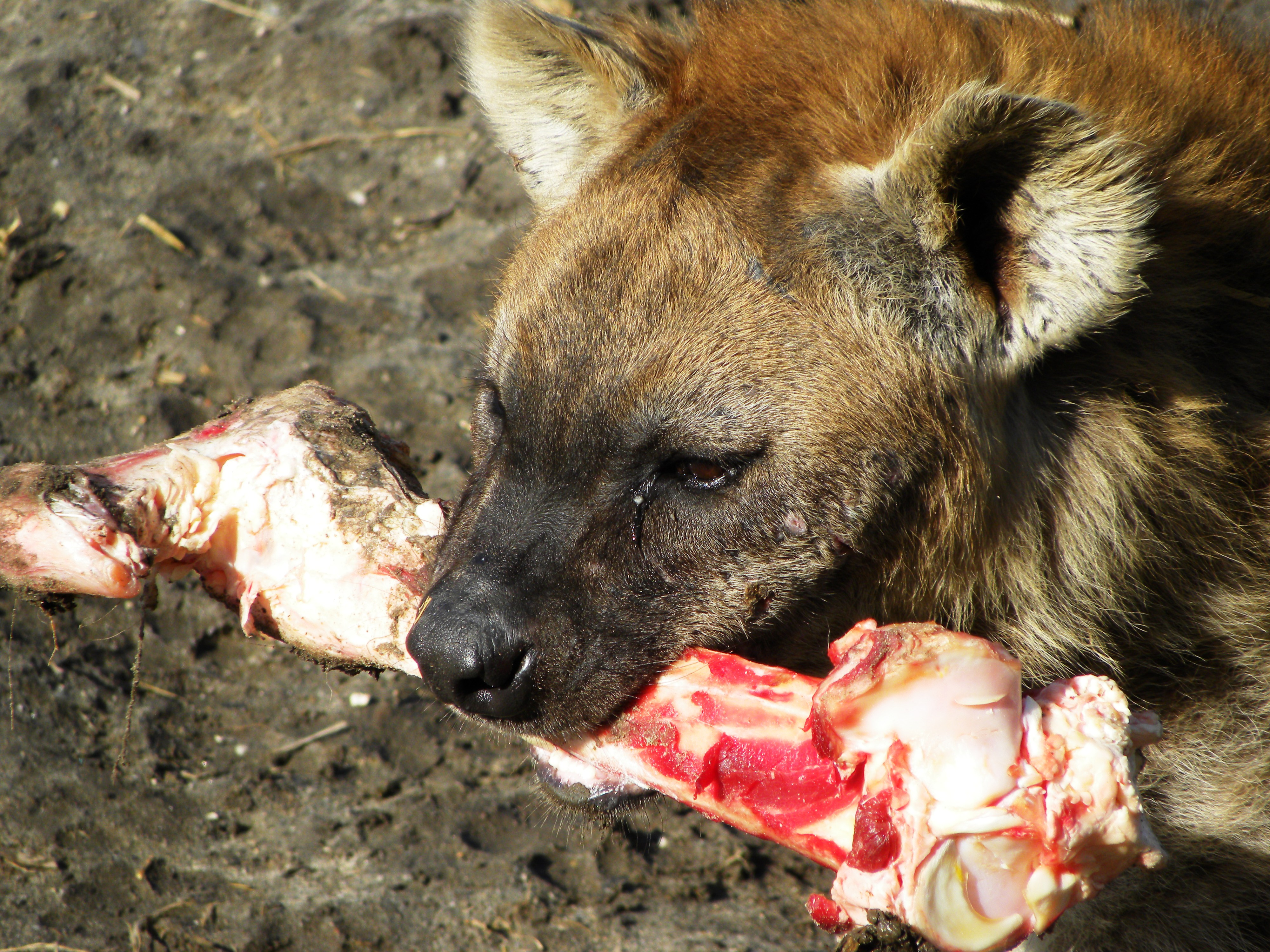 Gevlekte hyena